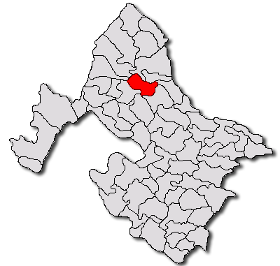 Categorie:Hărţi ale judeţului Mehedinţi